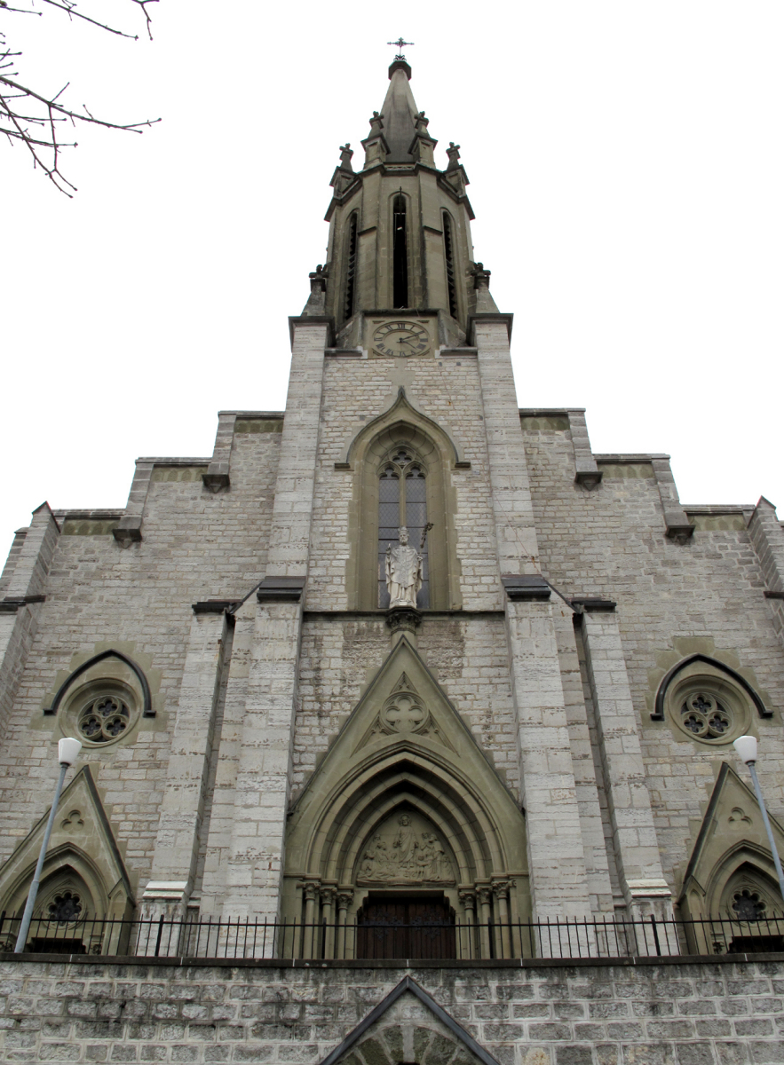 Châtel-Saint-Denis, église paroissiale